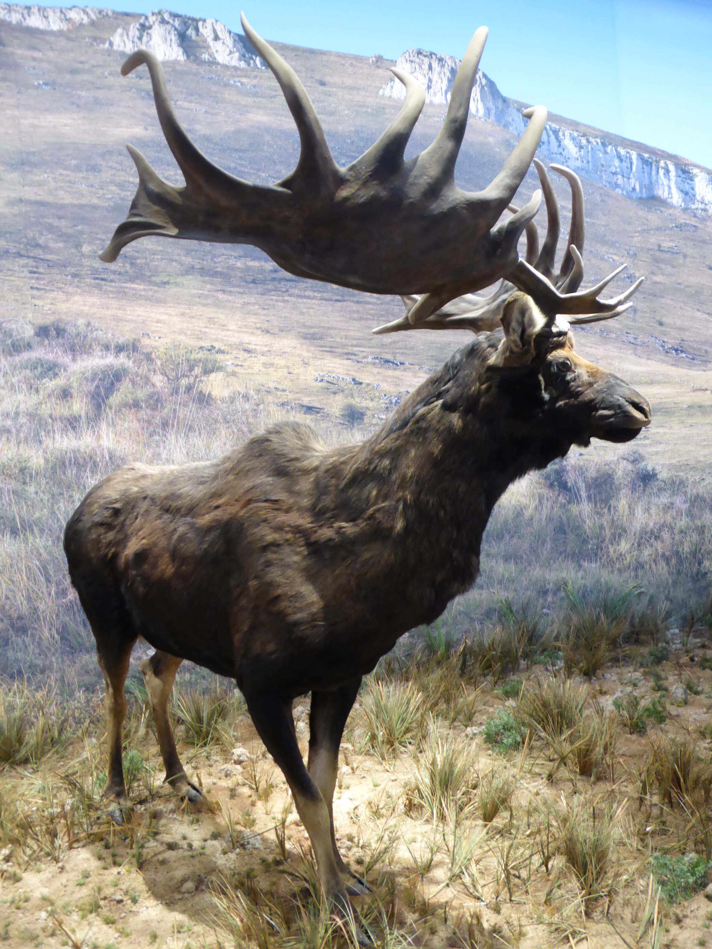 Reconstitution d'un mégacéros (Megaloceros giganteus), Galerie de l'Aurignacien, Caverne du Pont d'Arc, France.